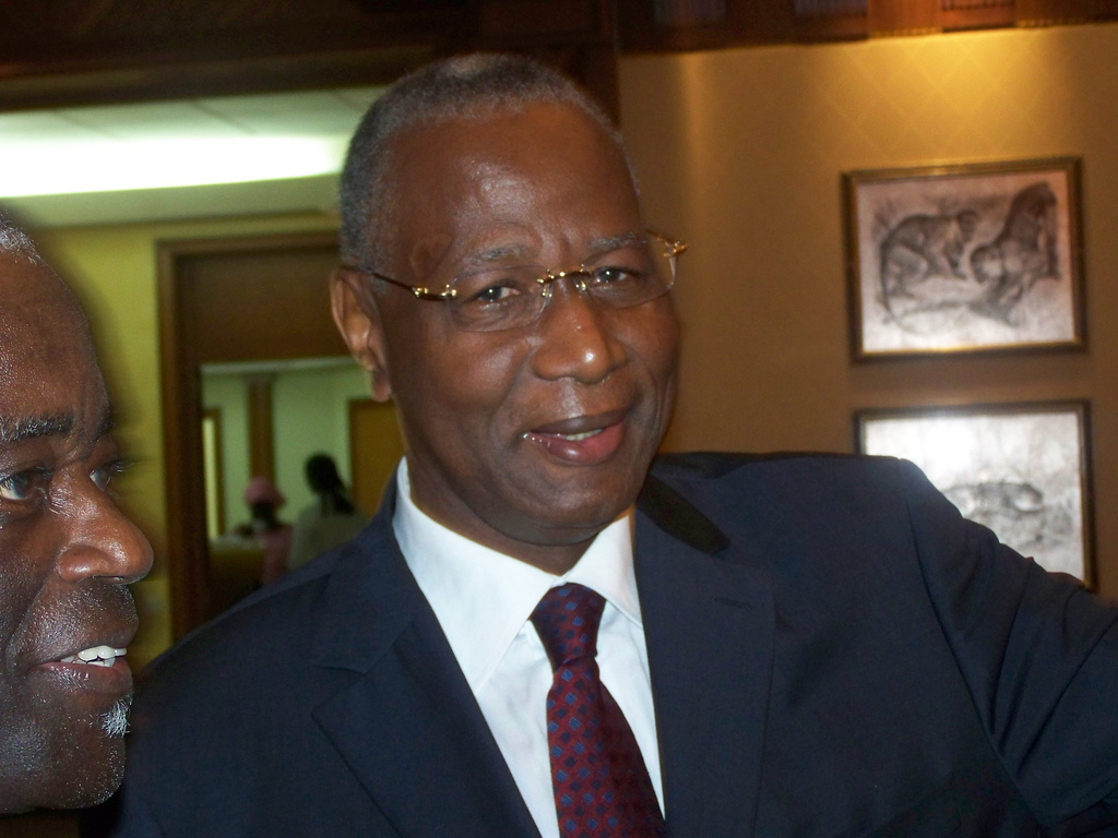 Abdoulaye Bathily aux Assises nationales du Sénégal à Dakar